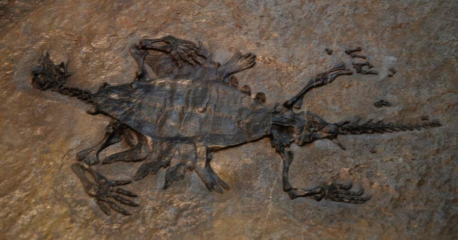 Fossil of Odontochelys, an extinct reptile- Picture at Bejing Museum of Natural History